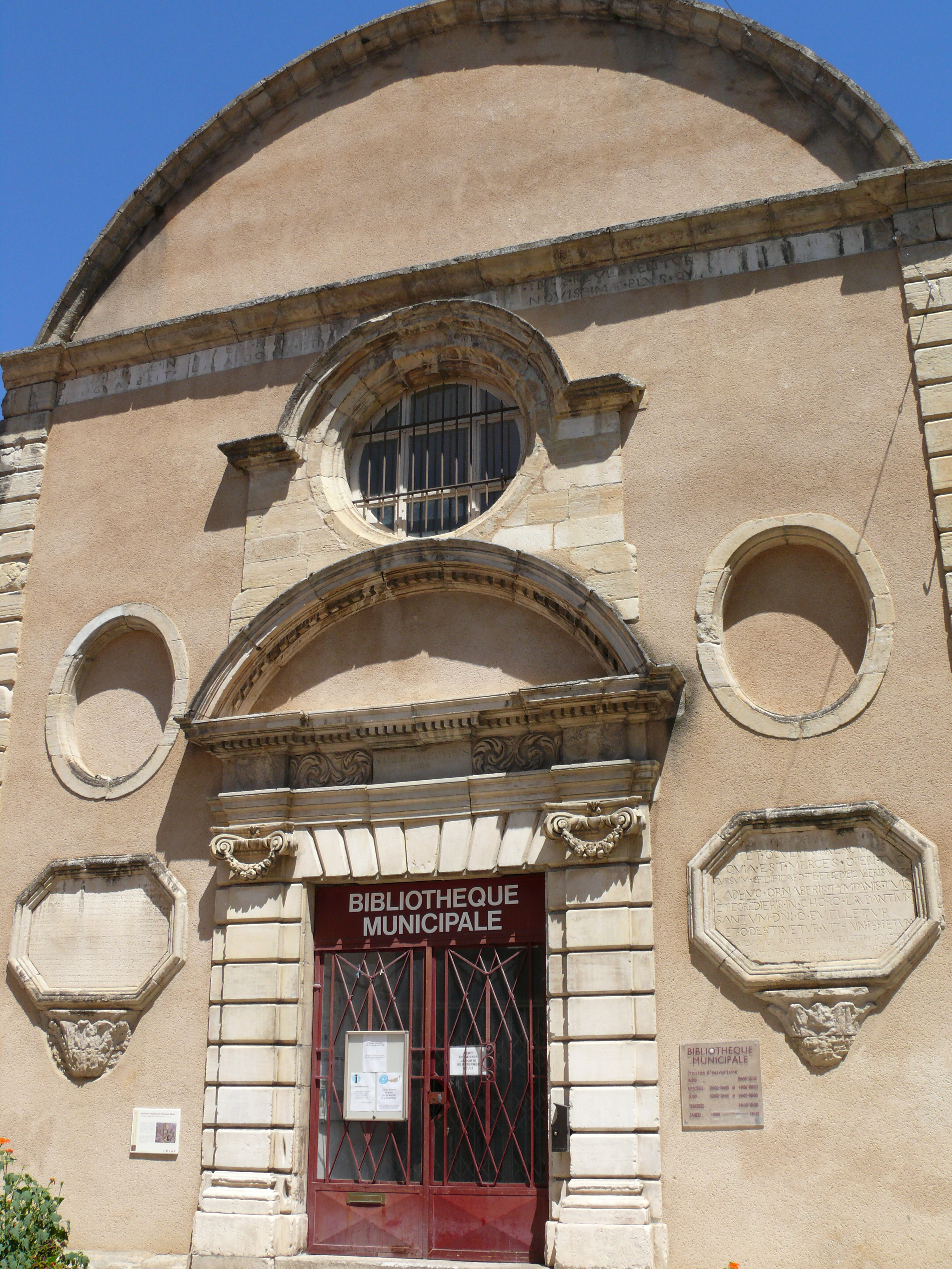 Villefranche-de-Rouergue - Bibliothèque municipale, ancienne chapelle des Pénitents-Bleus